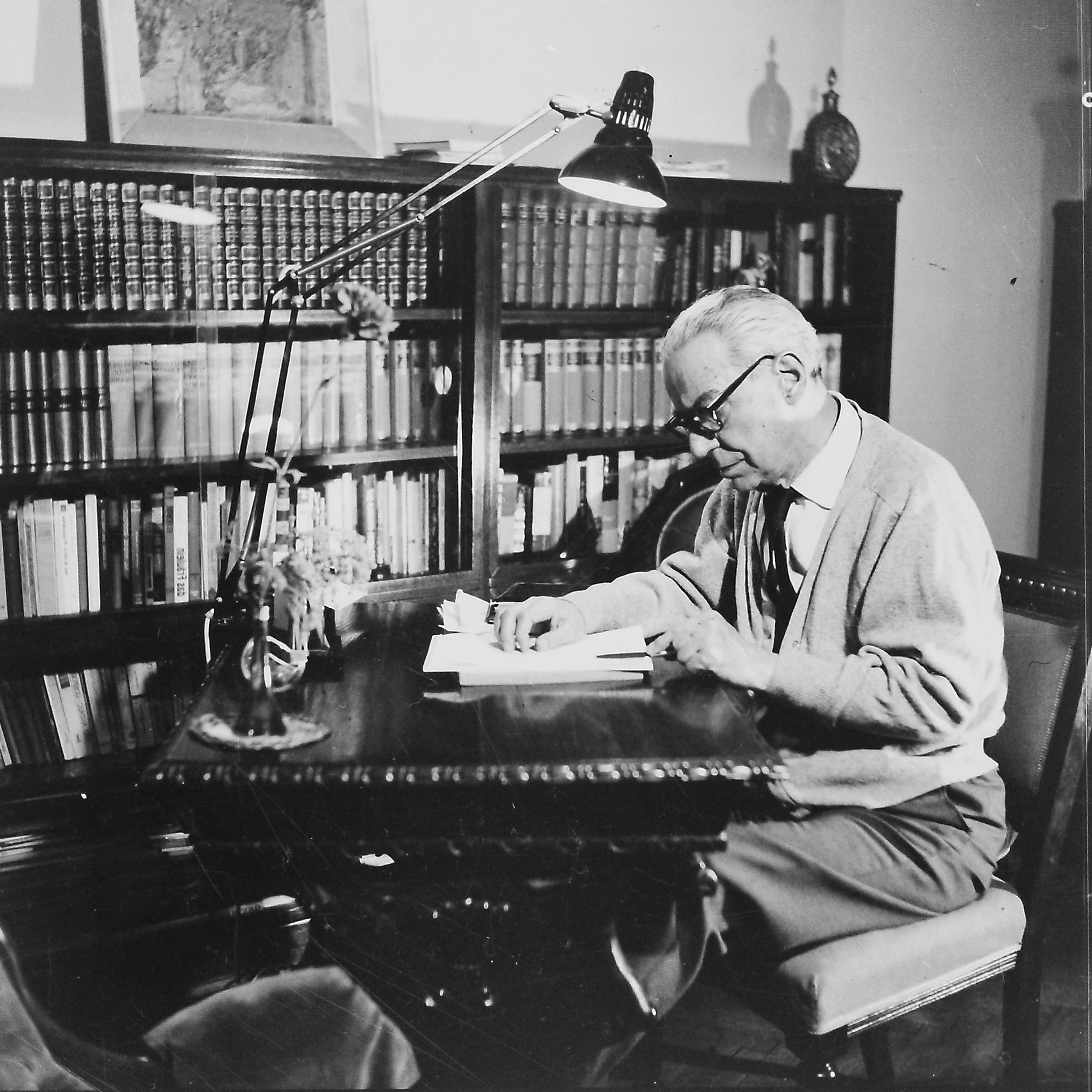 Ivo Andrić u svom domu.foto:Stevan Kragujević (po odobrenju kćerke Tanje Kragujević)